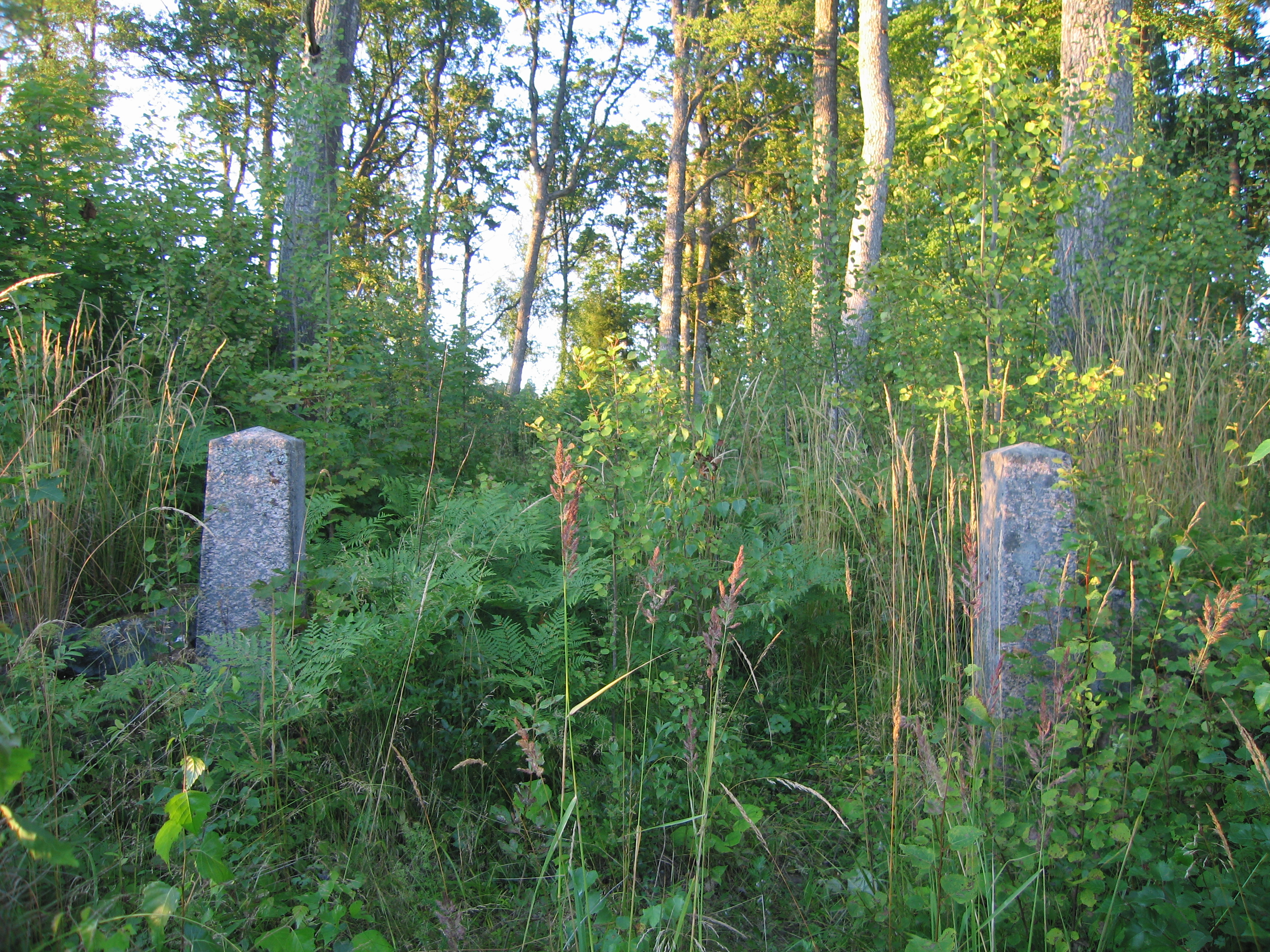 Kalmistu väravapostid